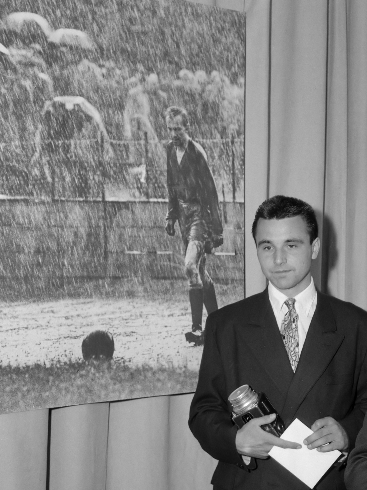 Uitreiking prijzen World Press Photo door burgemeester Kolfschoten in het Gemeentelijk Museum te Den Haag links Stanislav Tereba , rechts burgemeester 10 september 1959